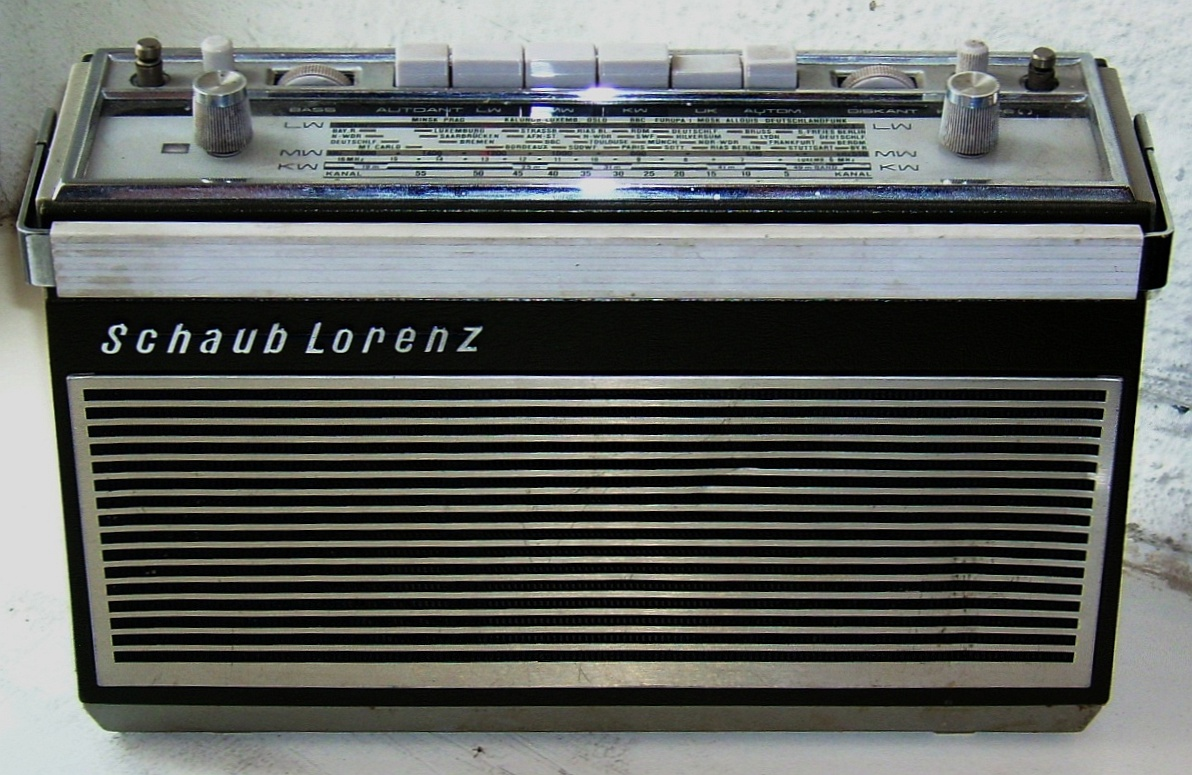 Kofferradio Schaub-Lorenz Standard Elektrik Lorenz